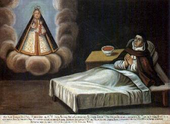 Fr. Tomás de la Virgen